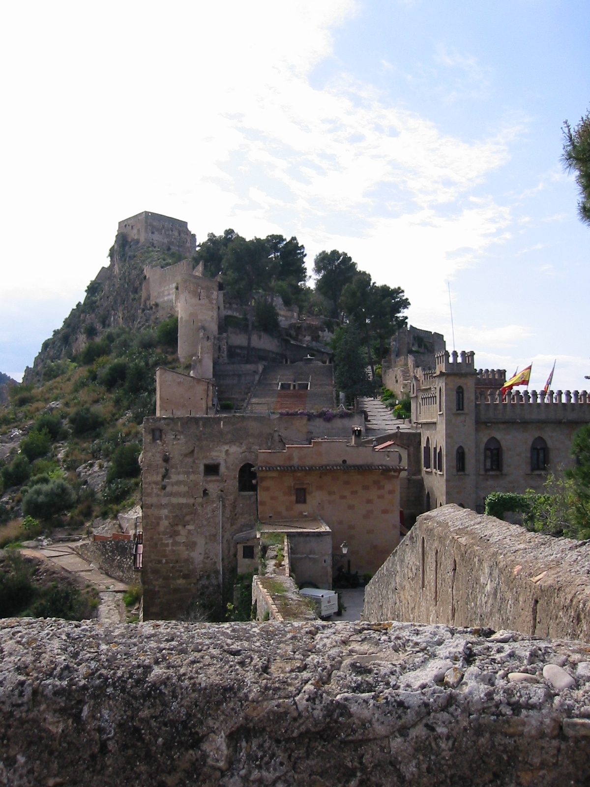 Die Burg von Játiva (2003) durch Jan Harenburg